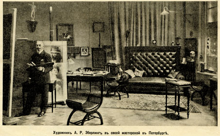 А.Эберлинг в своей мастерской